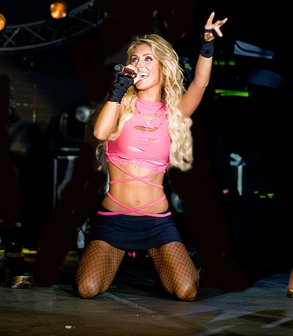 Anahí durante um show em 2008.